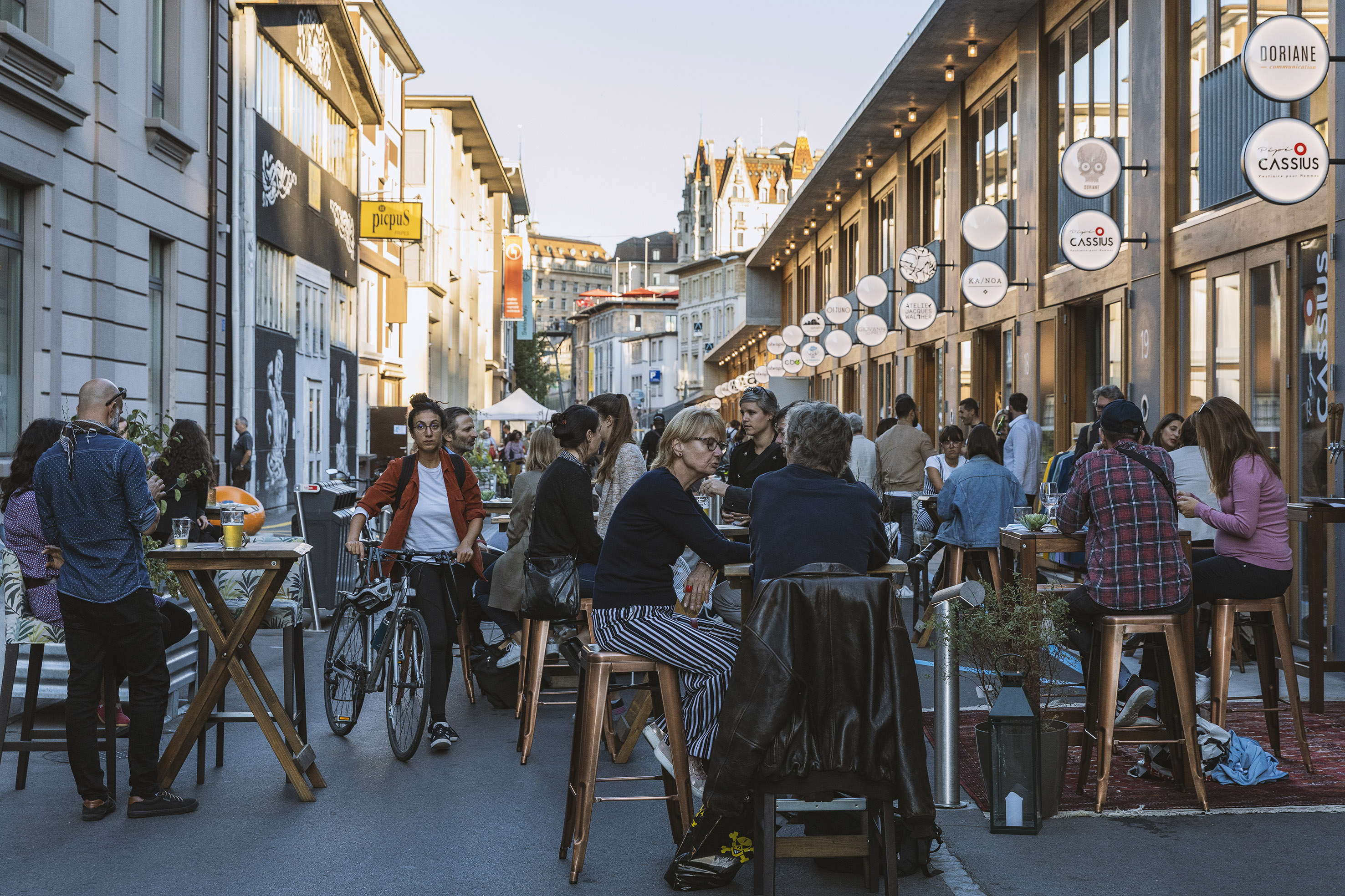 Soirée de la Ligne bleue septembre 2019